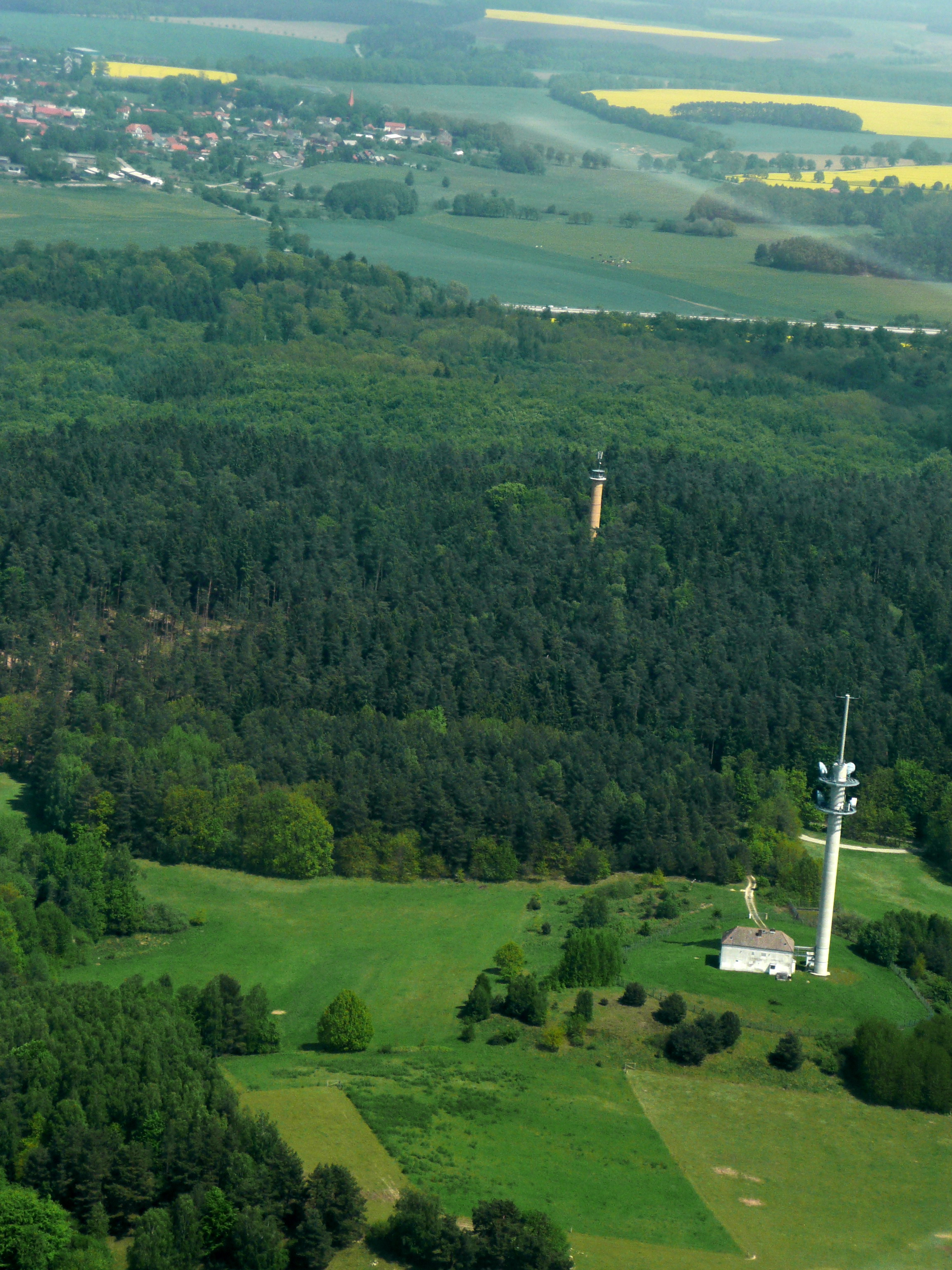 Blick auf die Ruhner Berge mit Aussichtsturm und Funkturm, im Hintergrund Marnitz und die Bundesautobahn 24.